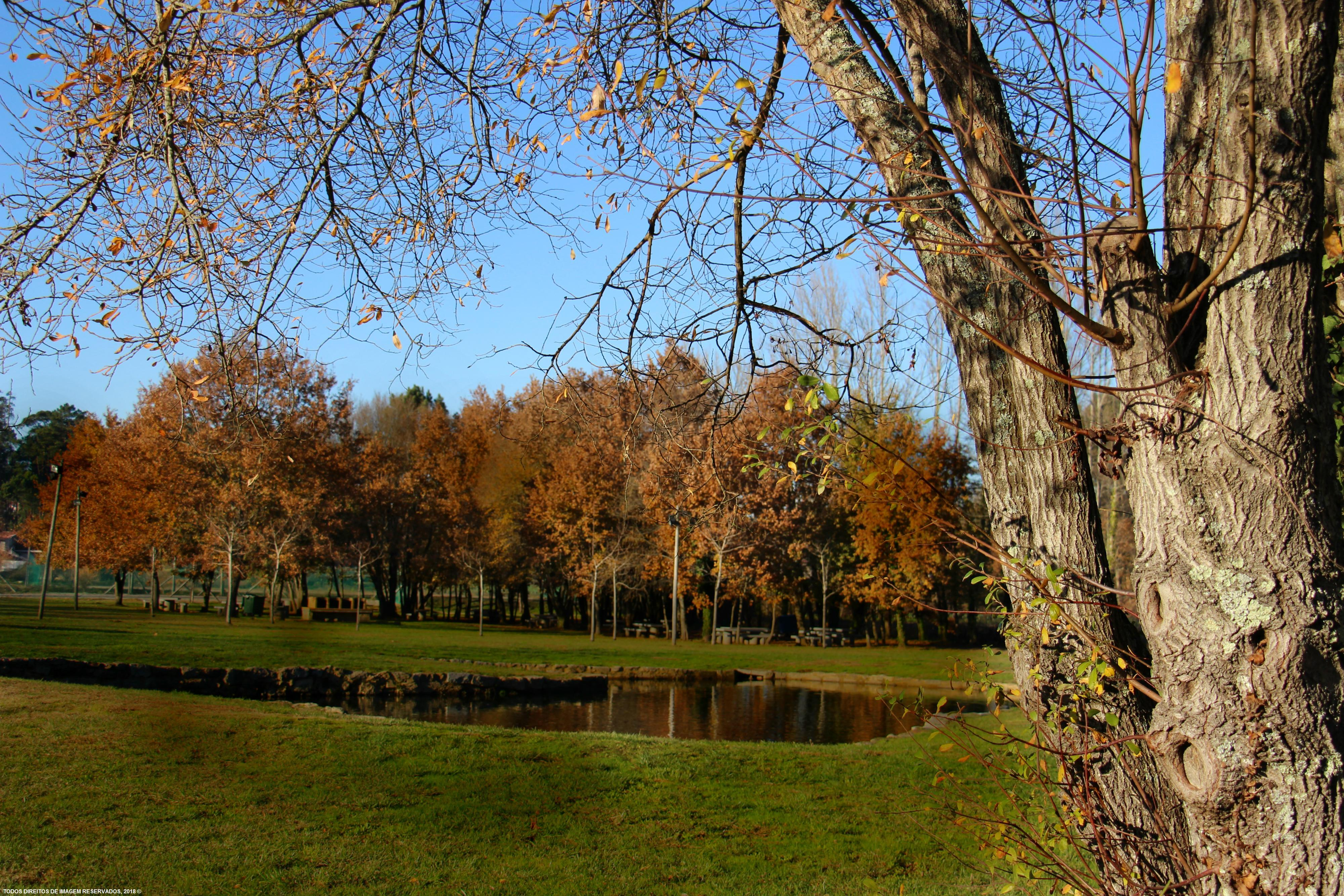 Parque Lazer de Argoncilhe, em inícios de 2018.